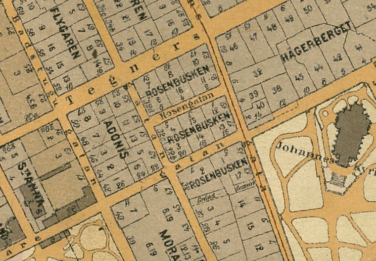 Del av Stockholmskarta visande kvarteret Rosenbuske med omgivning